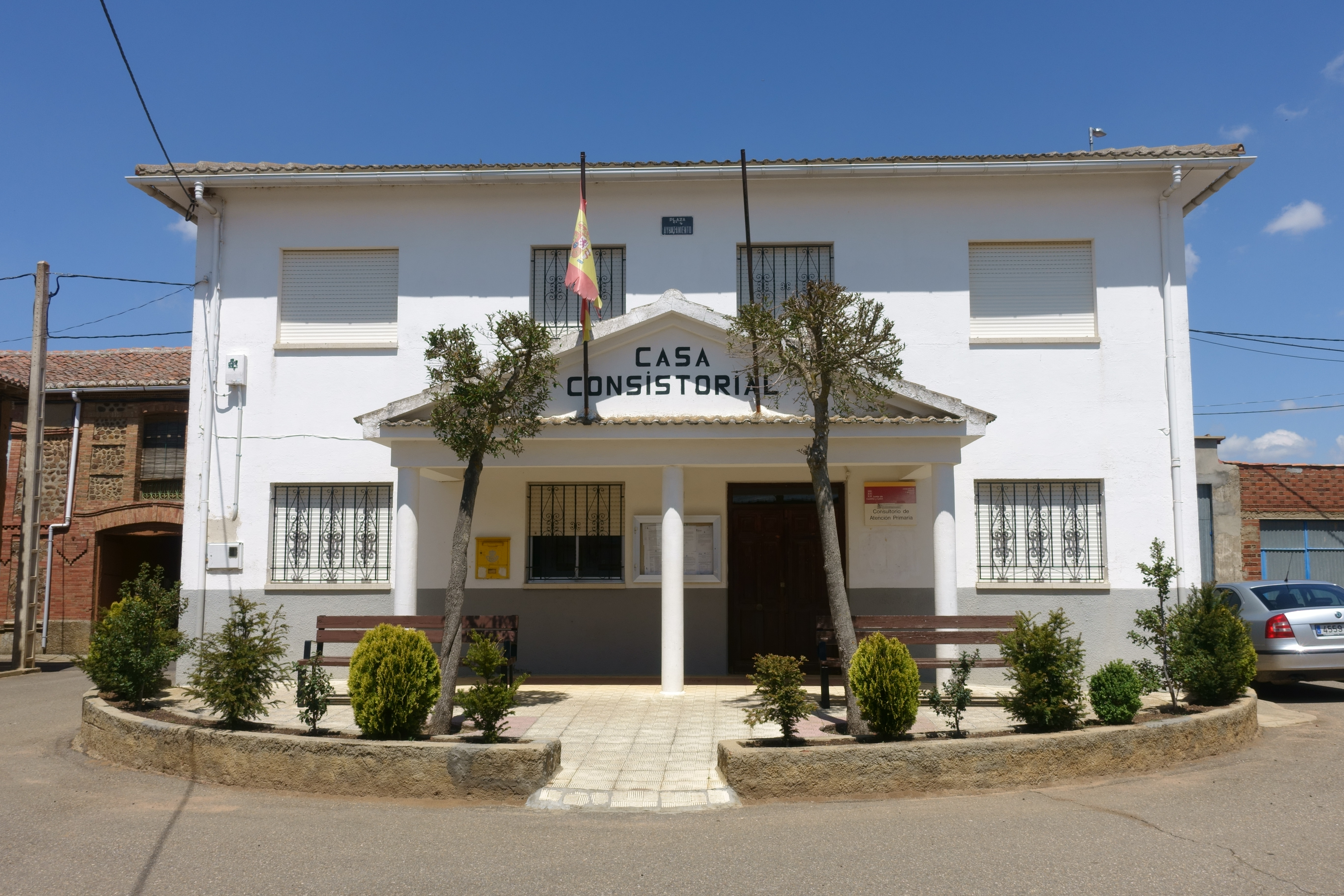 Casa consistorial de Castrotierra de Valmadrigal (León, España).